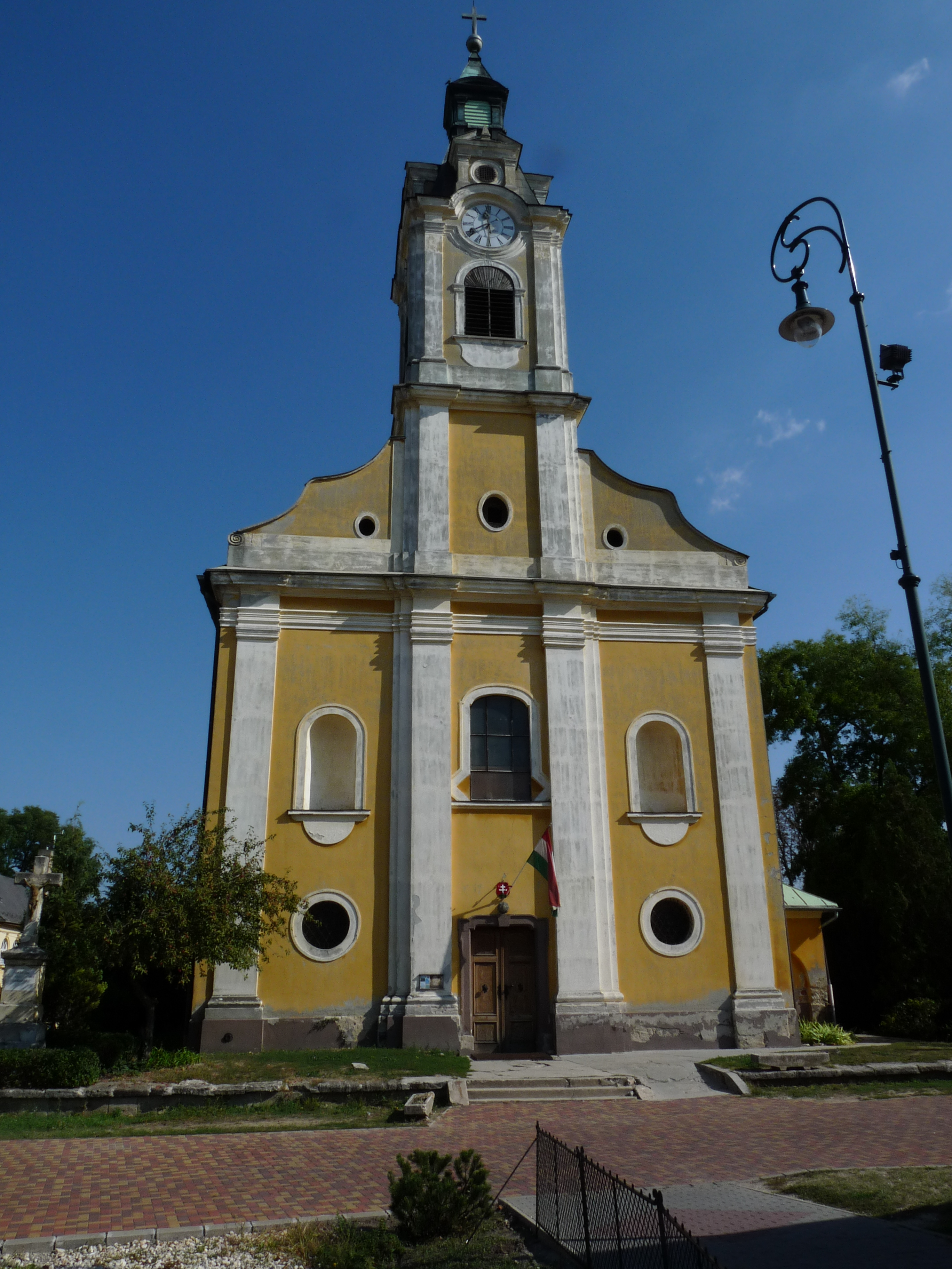 Szentháromság római katolikus templom (Bicske, Hősök tere)